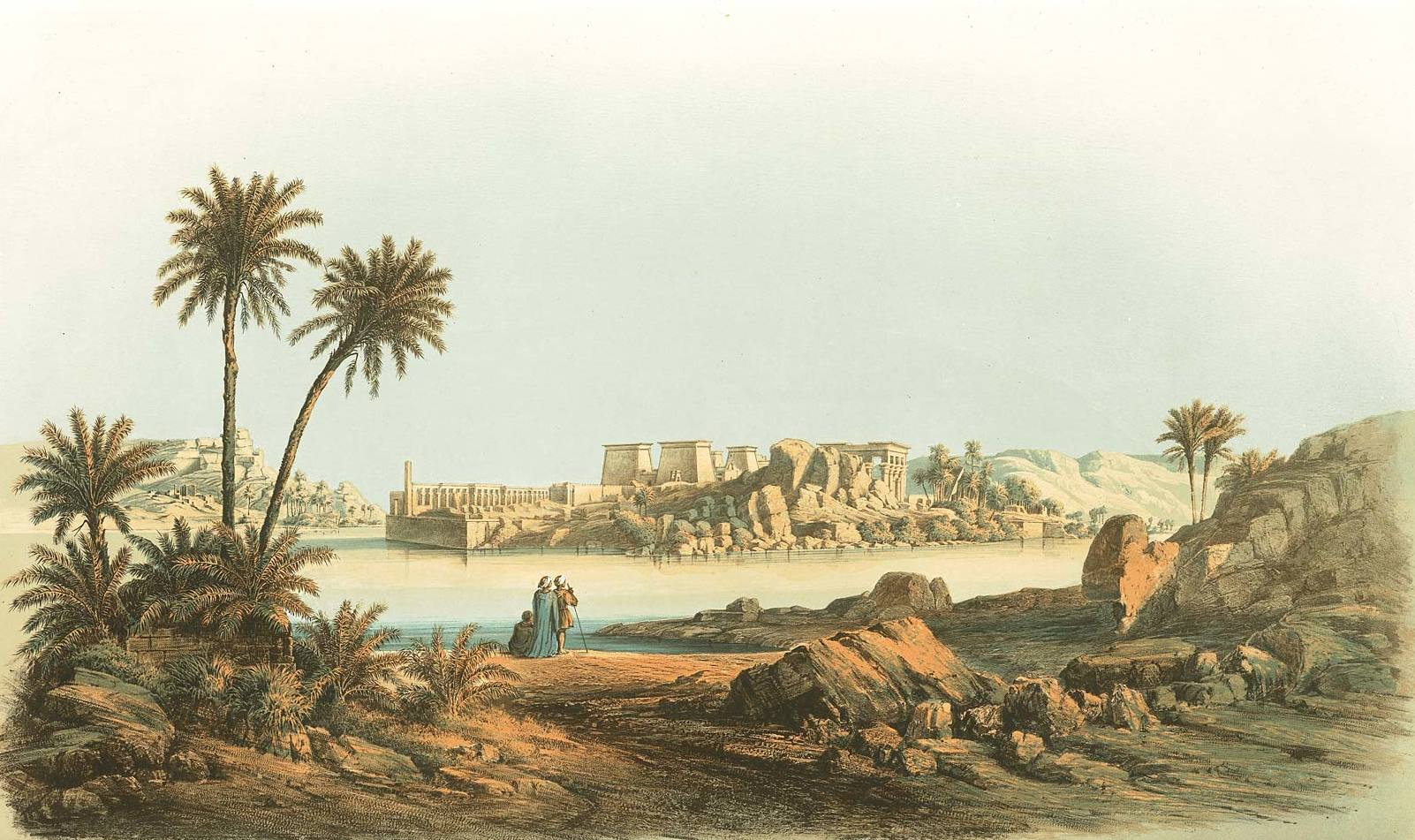 Denkmaeler aus Aegypten und Aethiopien nach den Zeichnungen der von Seiner Majestät dem Koenige von Preussen, Friedrich Wilhelm IV., nach diesen Ländern gesendeten, und in den Jahren 1842–1845 ausgeführten wissenschaftlichen Expedition auf Befehl Seiner Majestät